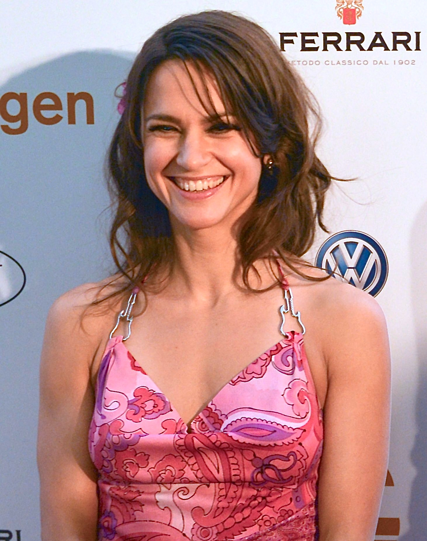 Melinda Kinnaman på Guldbaggegalan 21 januari 2013.